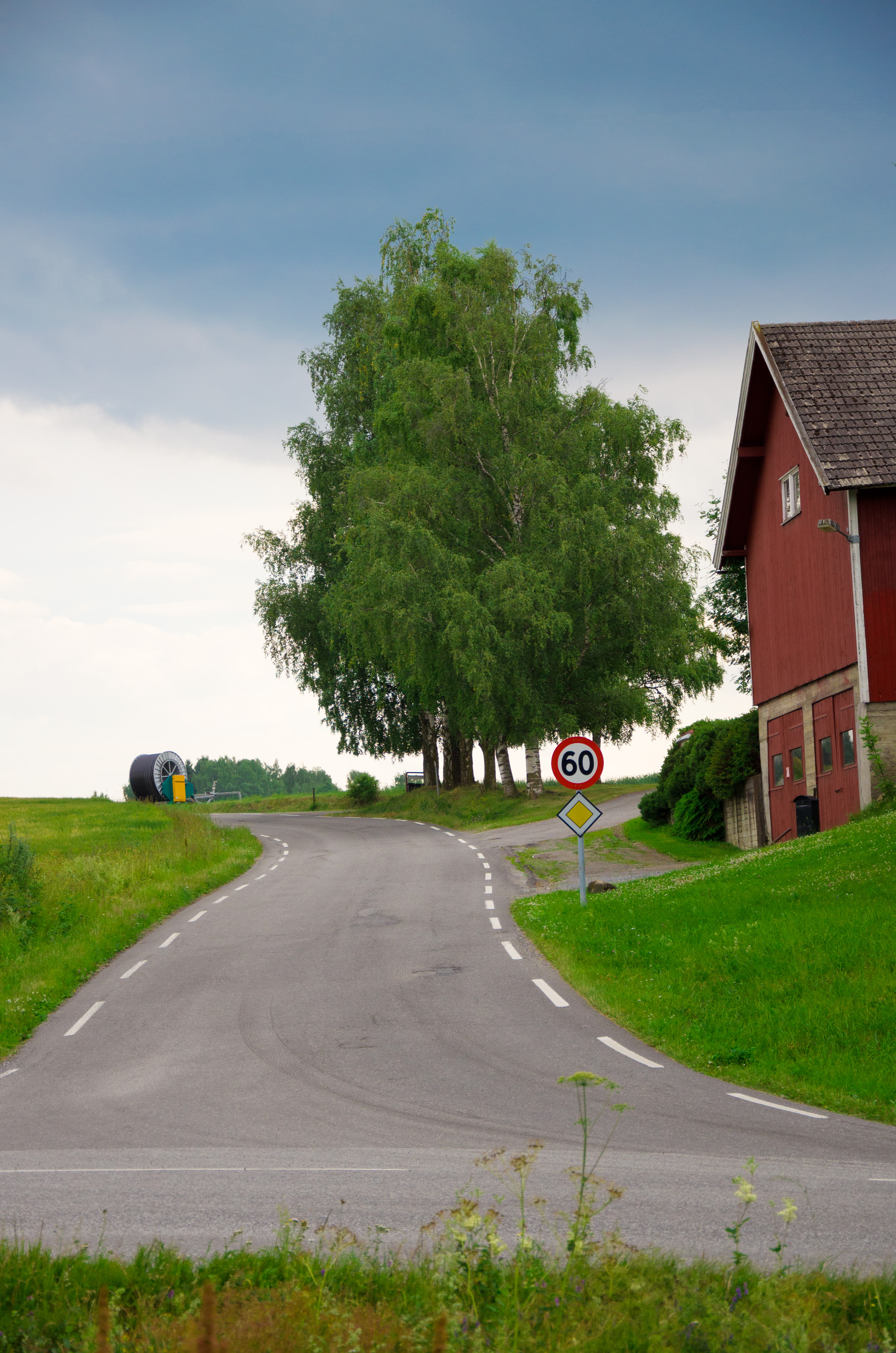 Fylkesvei 1798 (tidl. 104) Midtvangvegen